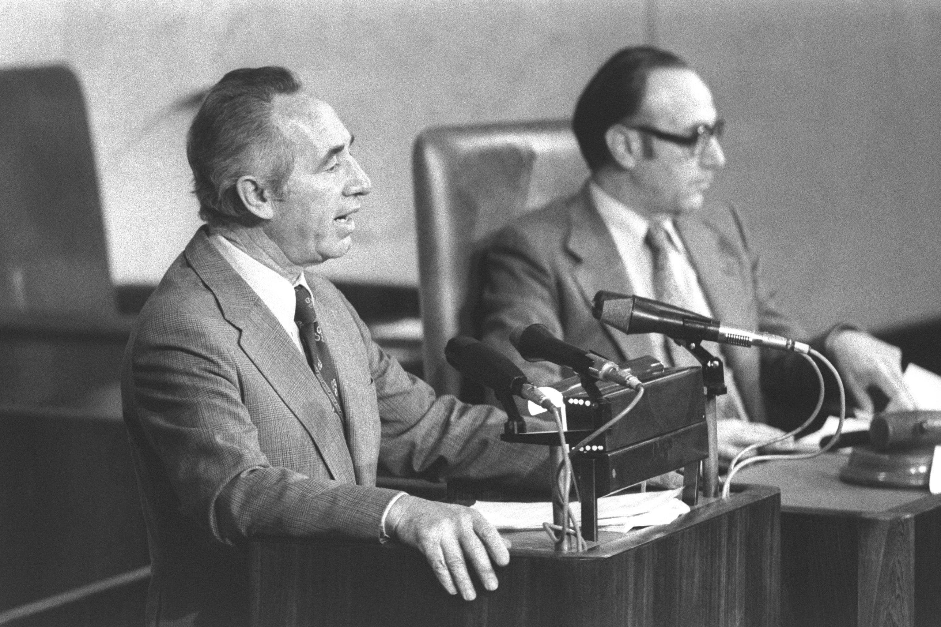 Opposition Leader MK Shimon Peres speaks before the Knesset Plenum on the eve of the ratification of the peace treaty with Egypt. יור האופוזיציה חכ שמעון פרס נושא דברים במליאת הכנסת בירושלים, ערב אשרור הסכם השלום עם מצרים. Photo: SAAR YAACOV, 03/20/1979